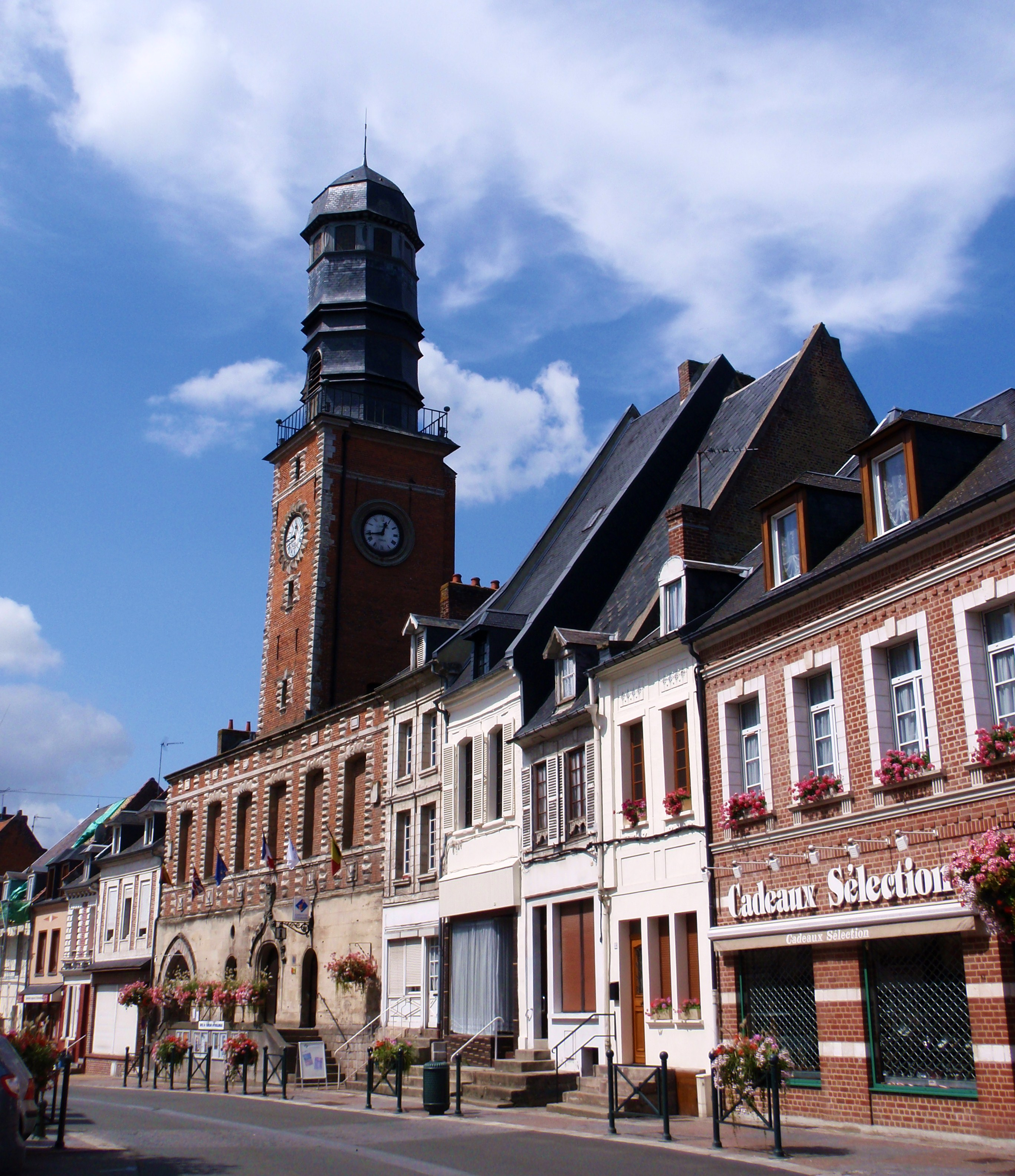 Doullens (Somme, France). Le beffroi, vu du Nord de la rue (en provenance du centre-ville).